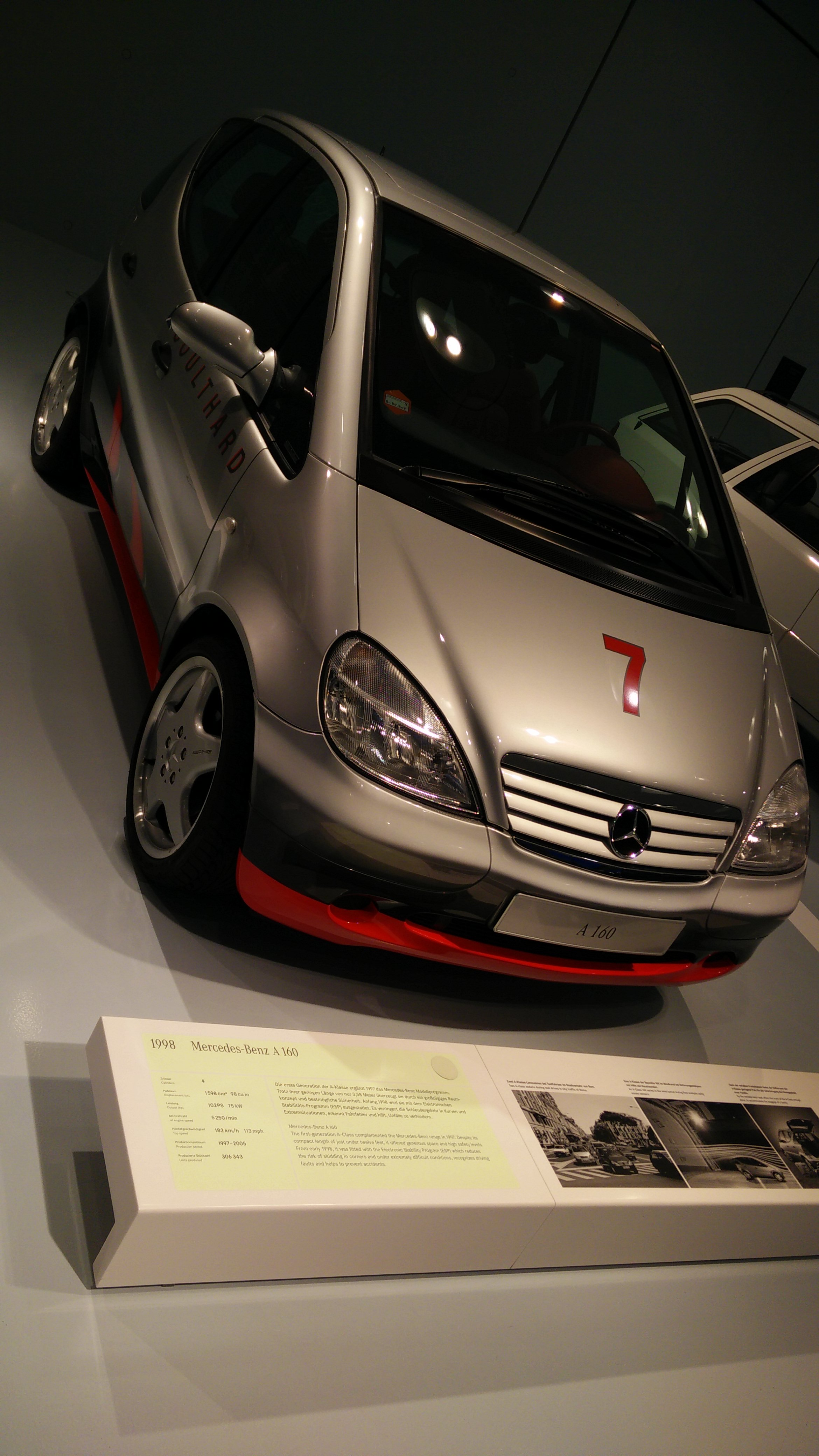 IMG_20141112_164531